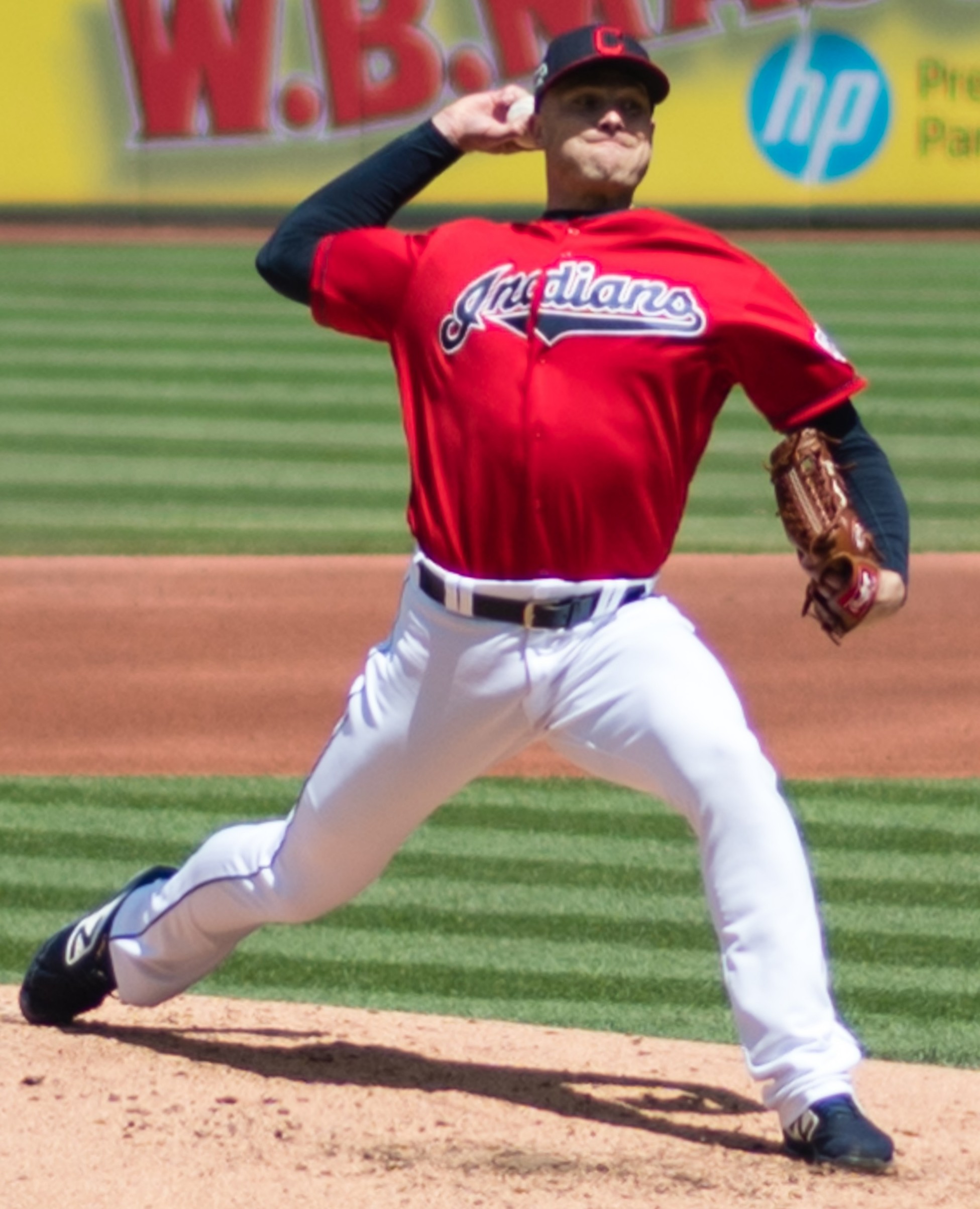 Seattle Mariners VS. Cleveland Indians